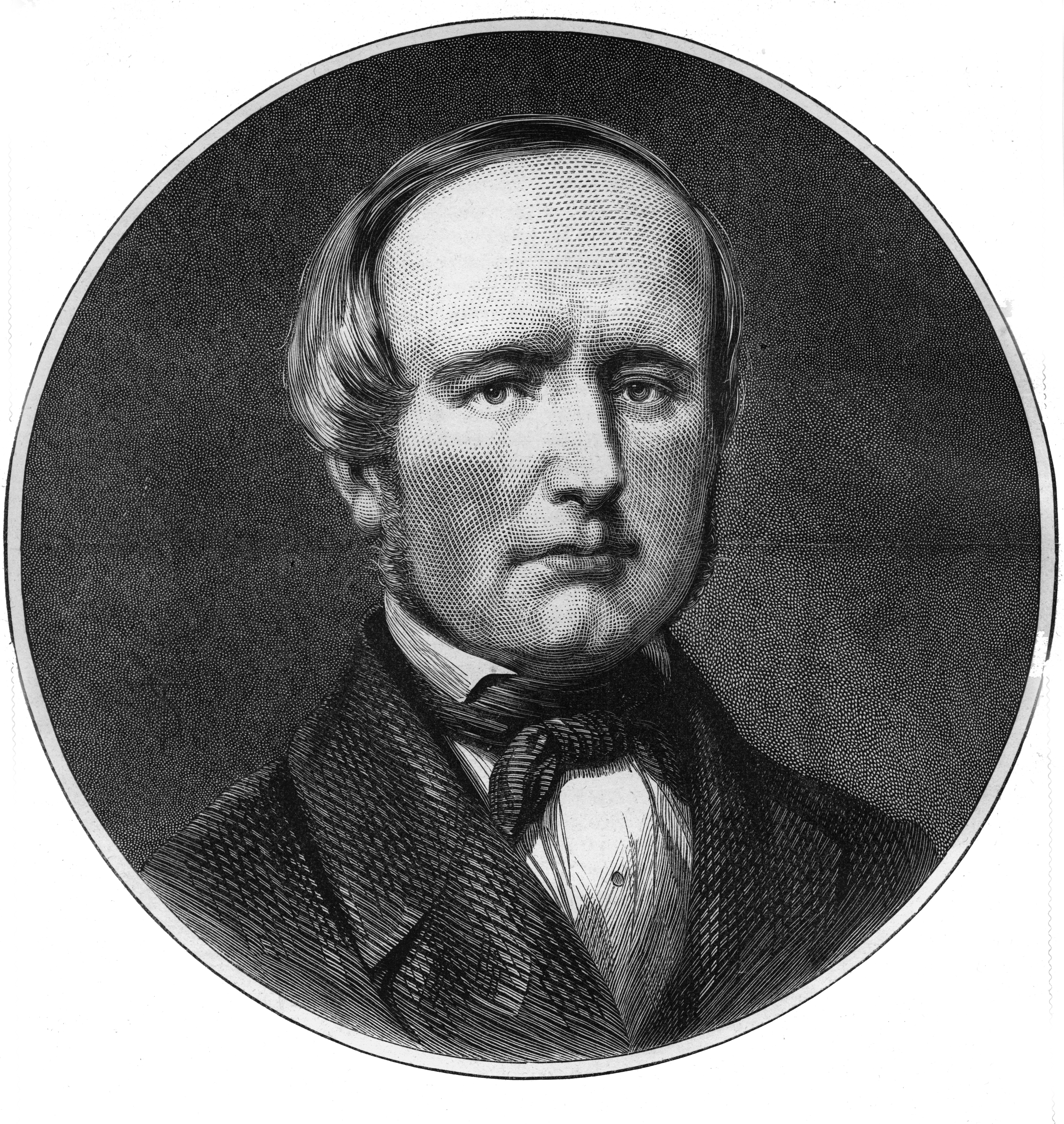 Johan August Wahlberg (1810-1856)